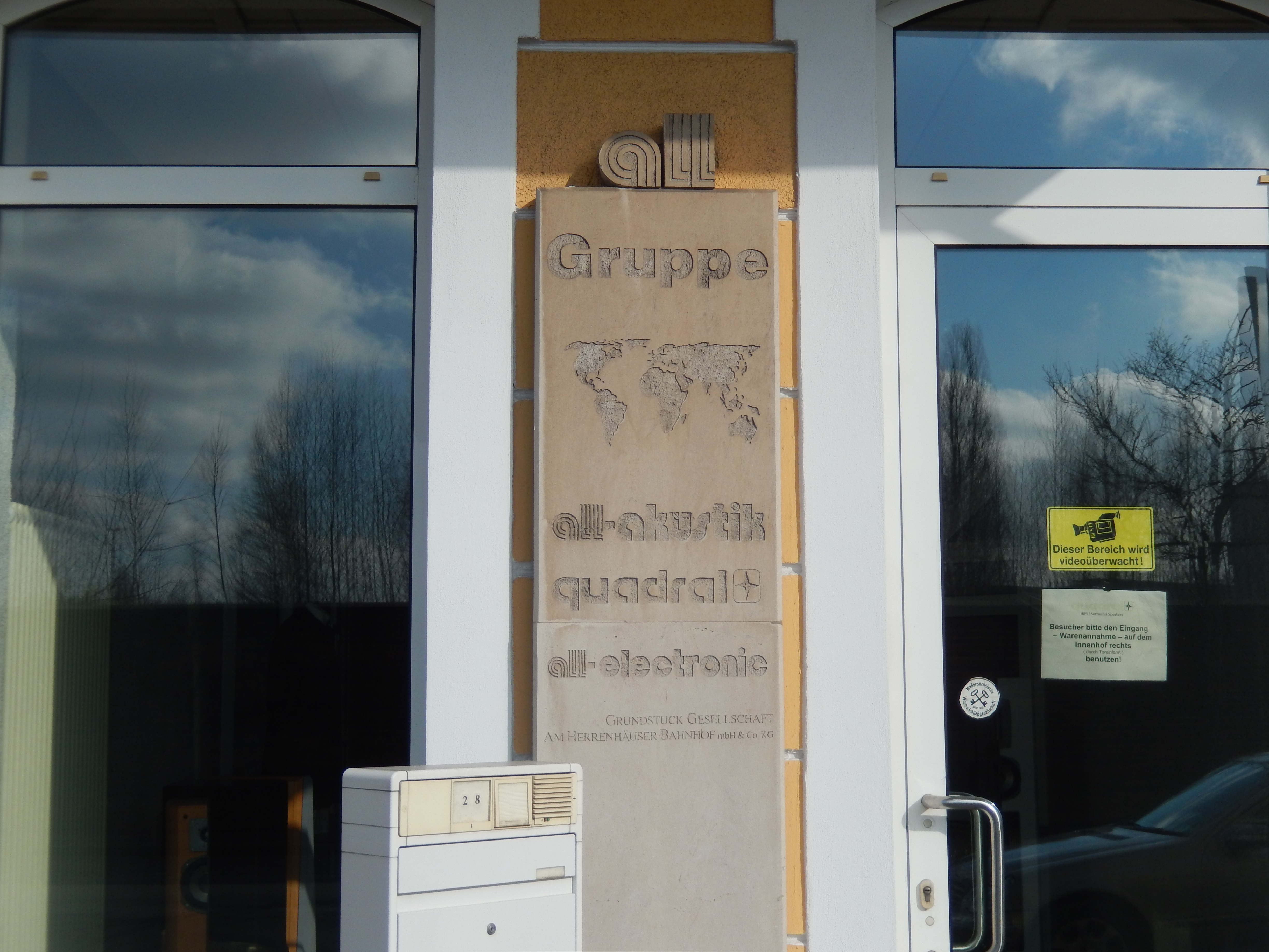 Sitz der Firma Quadral in Hannover